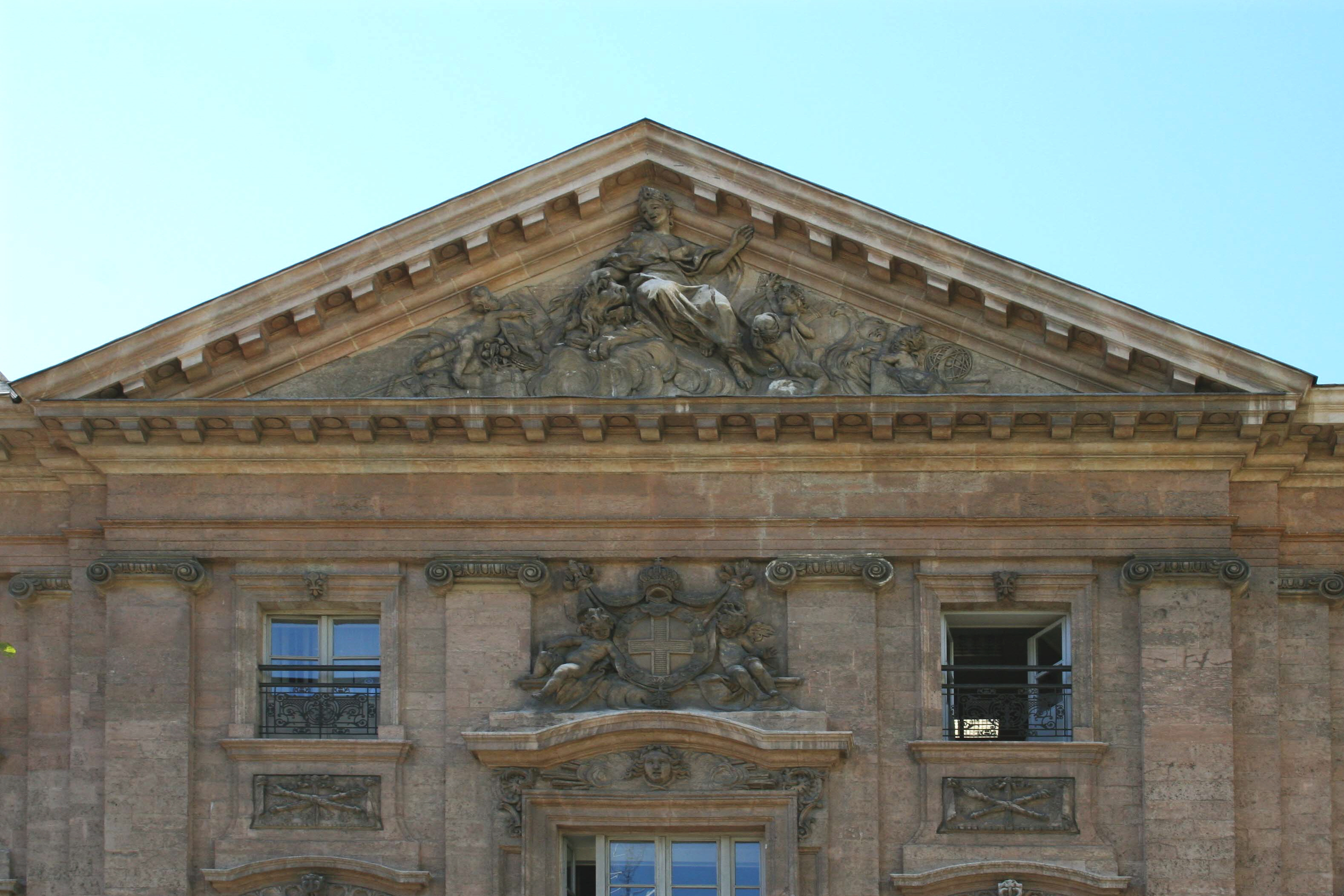 Façade de l'hôtel Daviel à Marseille. Sculptures de Jean-Michel Verdiguier (1706-1796)